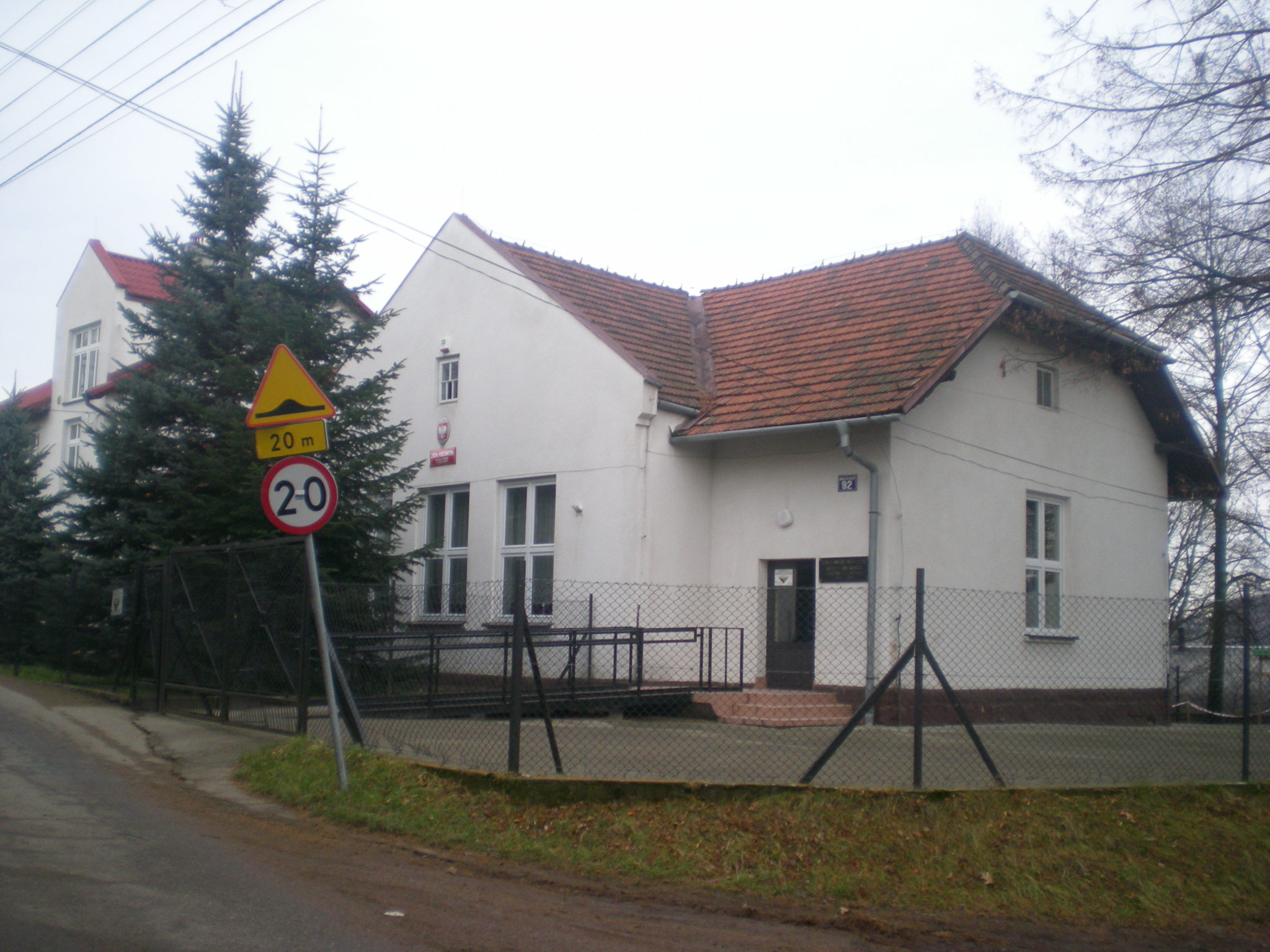 Szkoła Podstawowa im. św. Kingi w Bilczycach